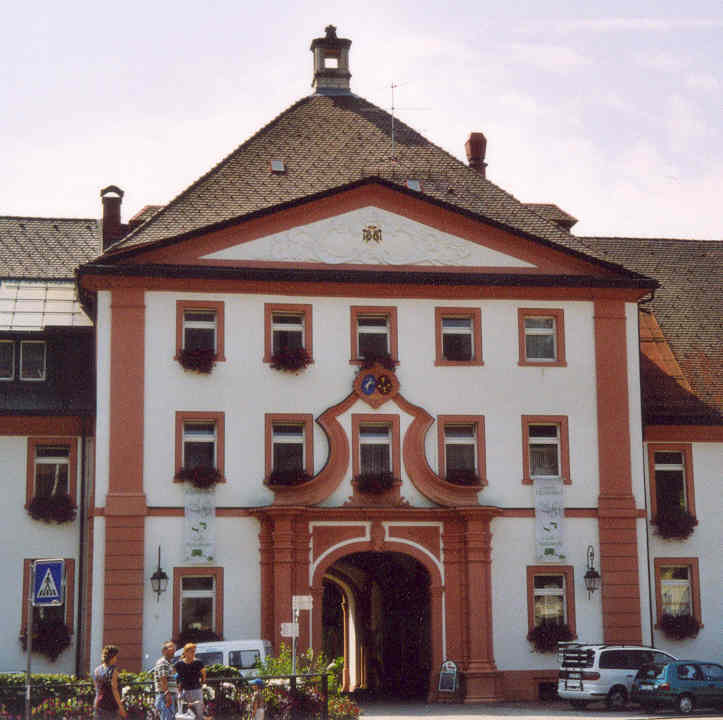 Sankt Blasien. Barockes Torgebäude der ehemaligen Benediktiner-Abtei.